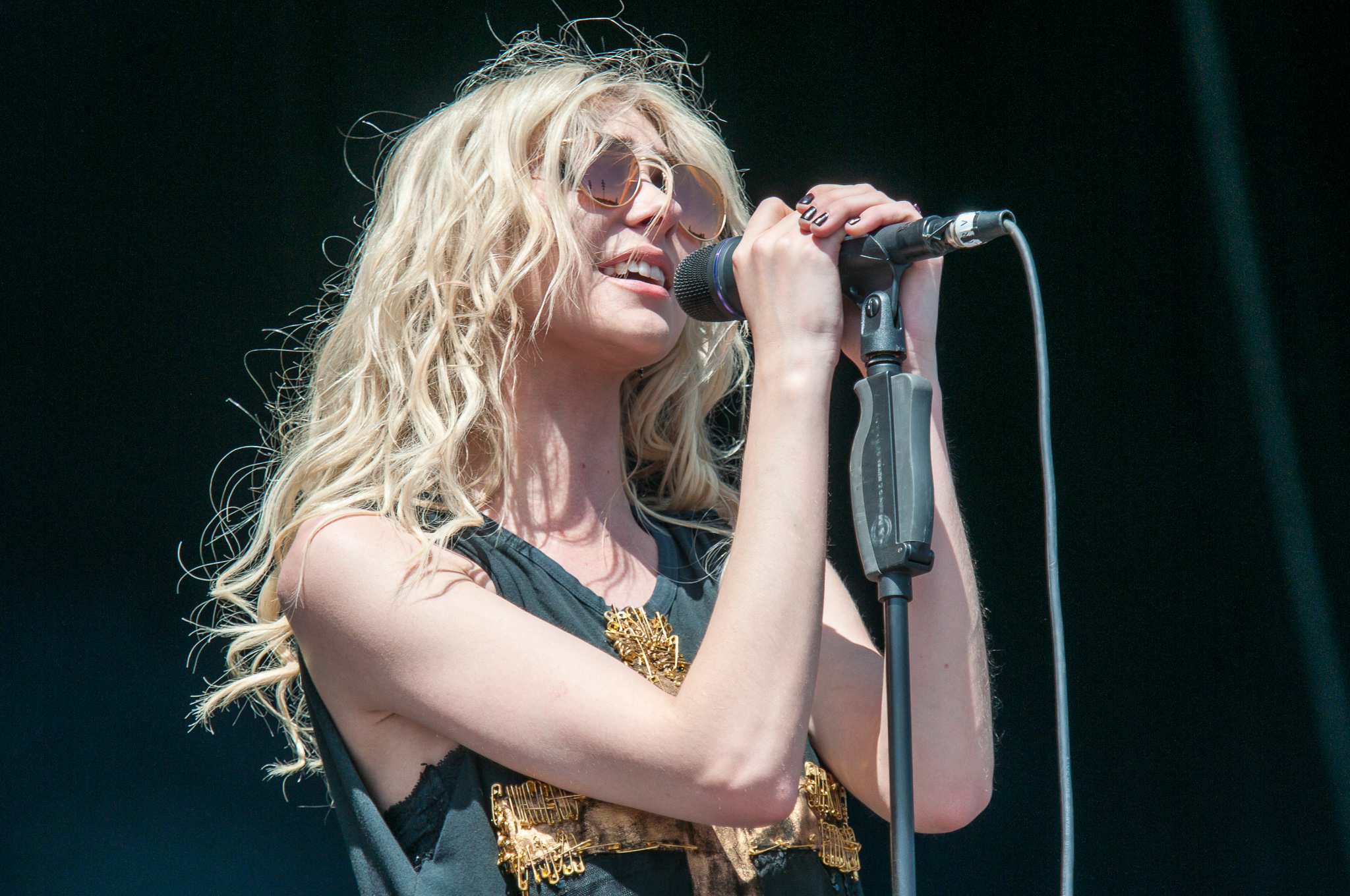 ARGO-Konzerte,Centerstage,Konzert,Livekonzert,Livemusik,Musik,RiP,Rock im Park 2014,Taylor Momsen,The Pretty Reckless